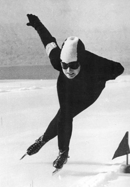 Gisela Toews Zentralbild ATP 3.2.1960 DDR-Olympiateilnehmer für die gemeinsame deutsche Mannschaft zu den 8.Olympischen Winterspielen in Squaw Valley vom 18. bis 28.2.1960 UBz: Eisschnelläuferin Gisela Toews. Abgebildete Personen: Toews, Gisela: Eisschnelläuferin, Olympiateilnehmerin 1960, DDR